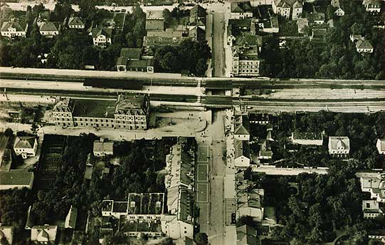 Radebeul Bahnhof Kötzschenbroda vor 1912. An der Güterhofstraße 1 steht noch der Vorgängerbau von Wohn- und Geschäftshaus Paul Pönitz